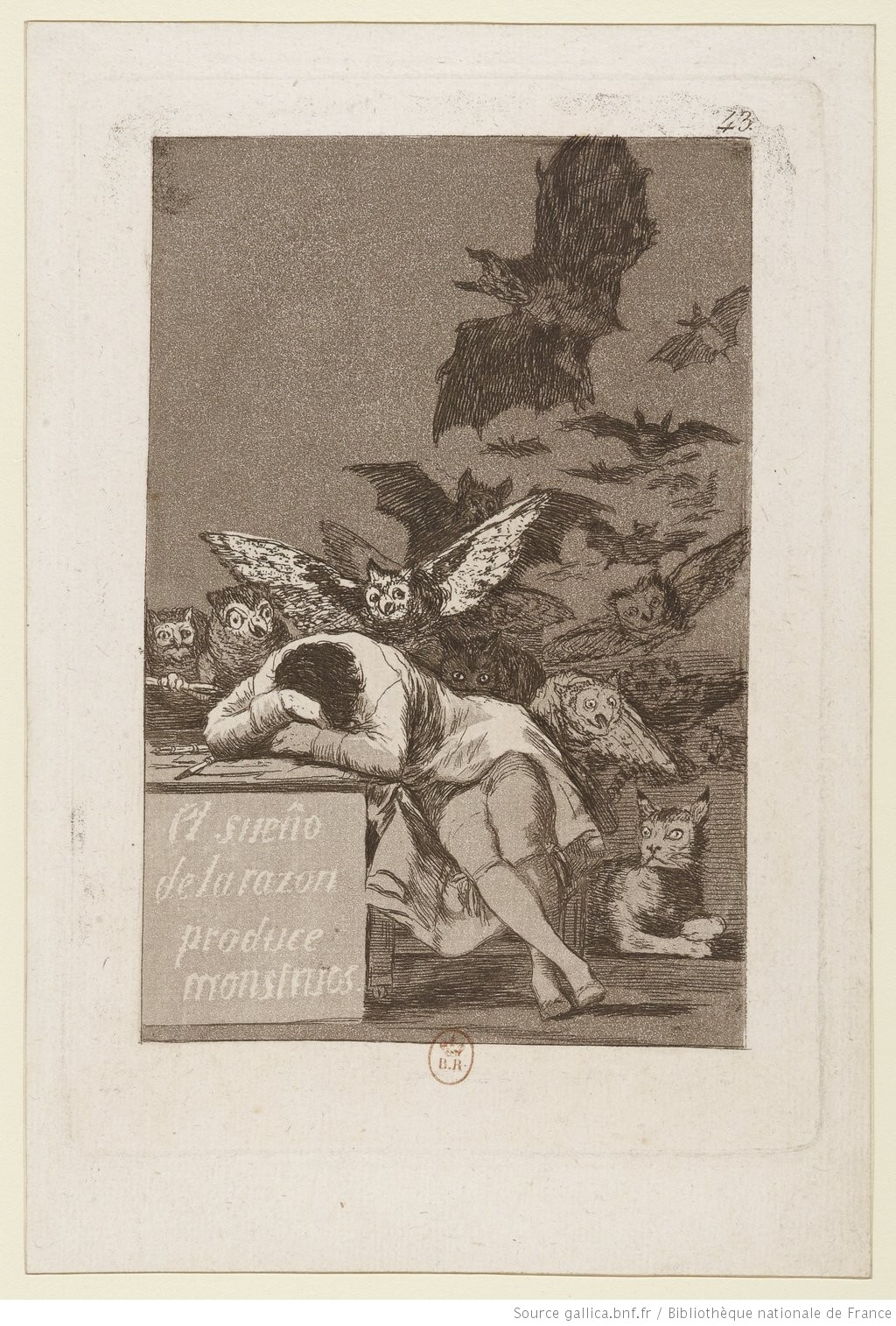 [Los caprichos]. P. 43, El sueno de la razon produce monstruos : [estampe] / [Goya]